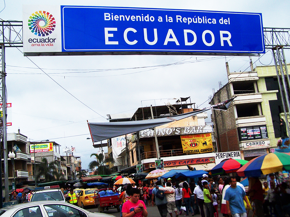 Huaquillas